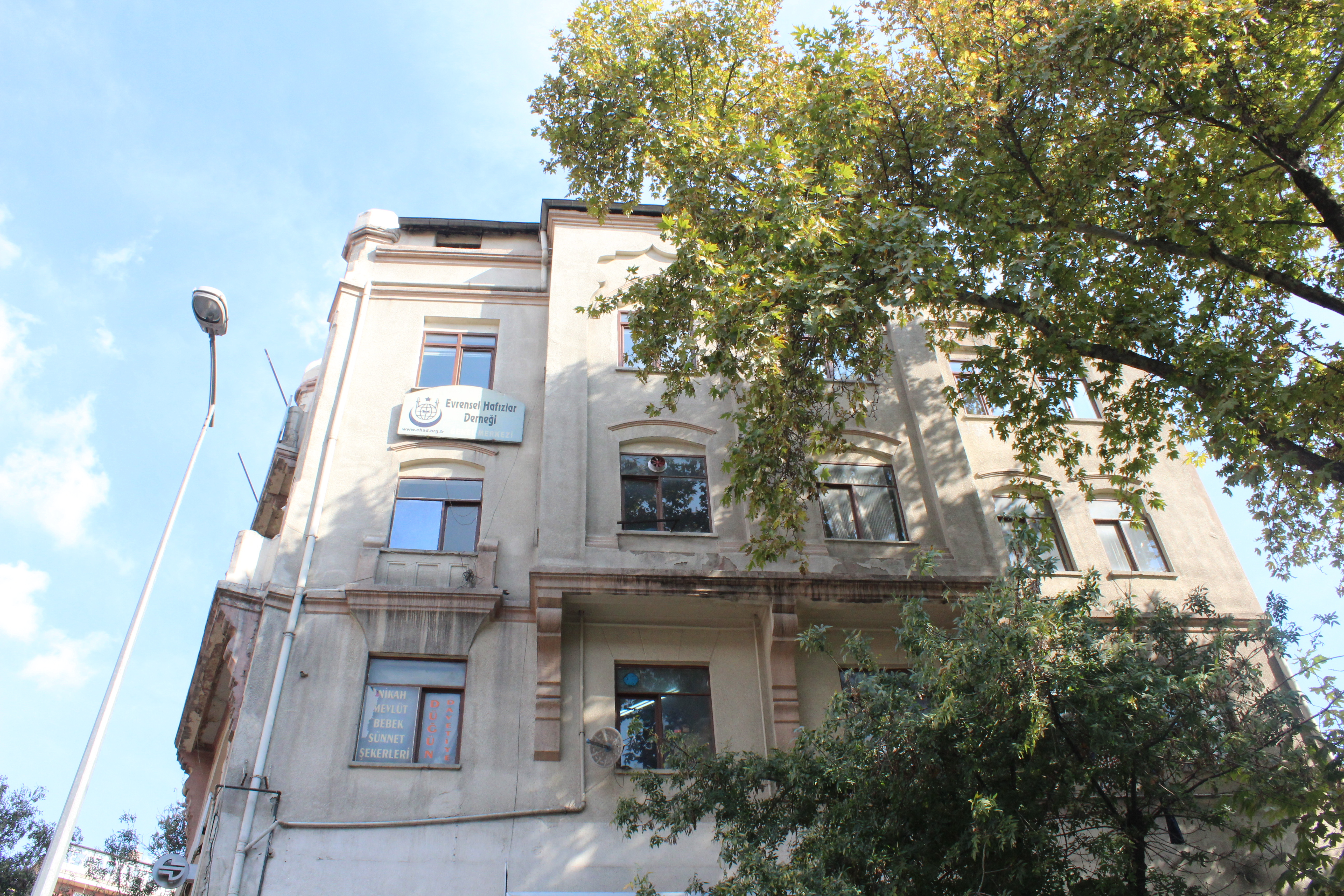 Hasan Fehmi Ataç Apartmanı